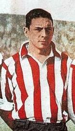 Alejandro Scopelli en Estudiantes de La Plata (Imagen recortada de Los Profesores).